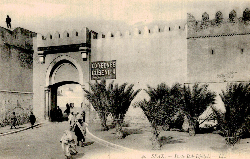 Bab El Kasbah ou Bab Djedid à Sfax